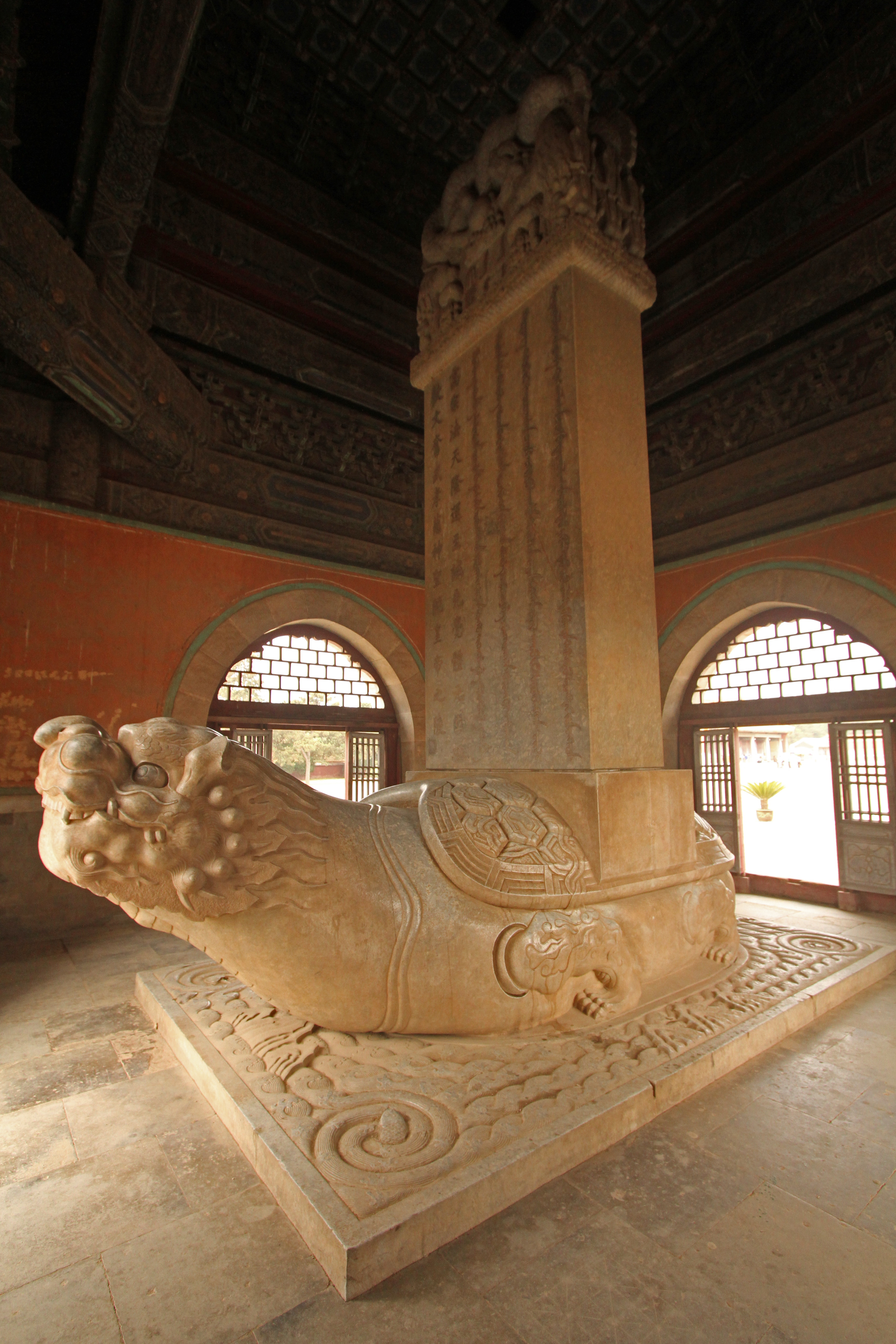 Qing Tombs 05